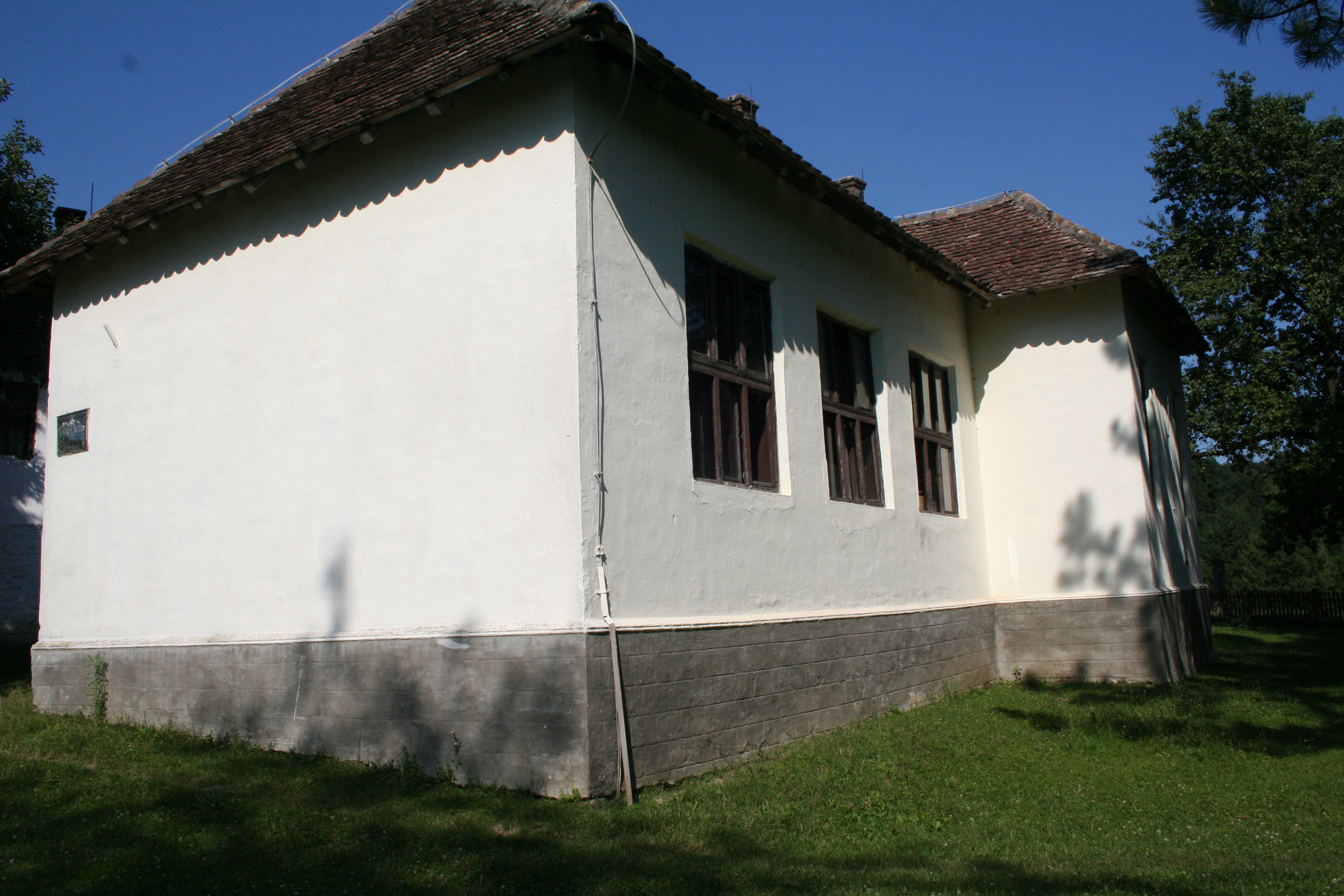 Zgrada škole, Gornja Sipulja